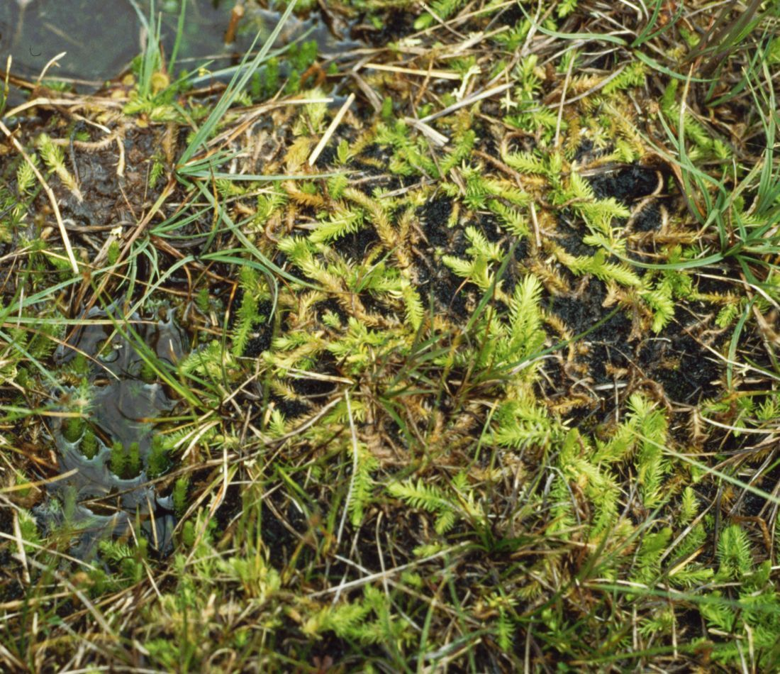 Moorbärlapp (Lycopodiella inundata), Bärlappgewächse (Lycopodiaceae) - Österreich/Austria/Autriche: Tirol, Lechtaler Alpen, Gurgltal, Moor "Kohlstatt" bei Obtarrenz